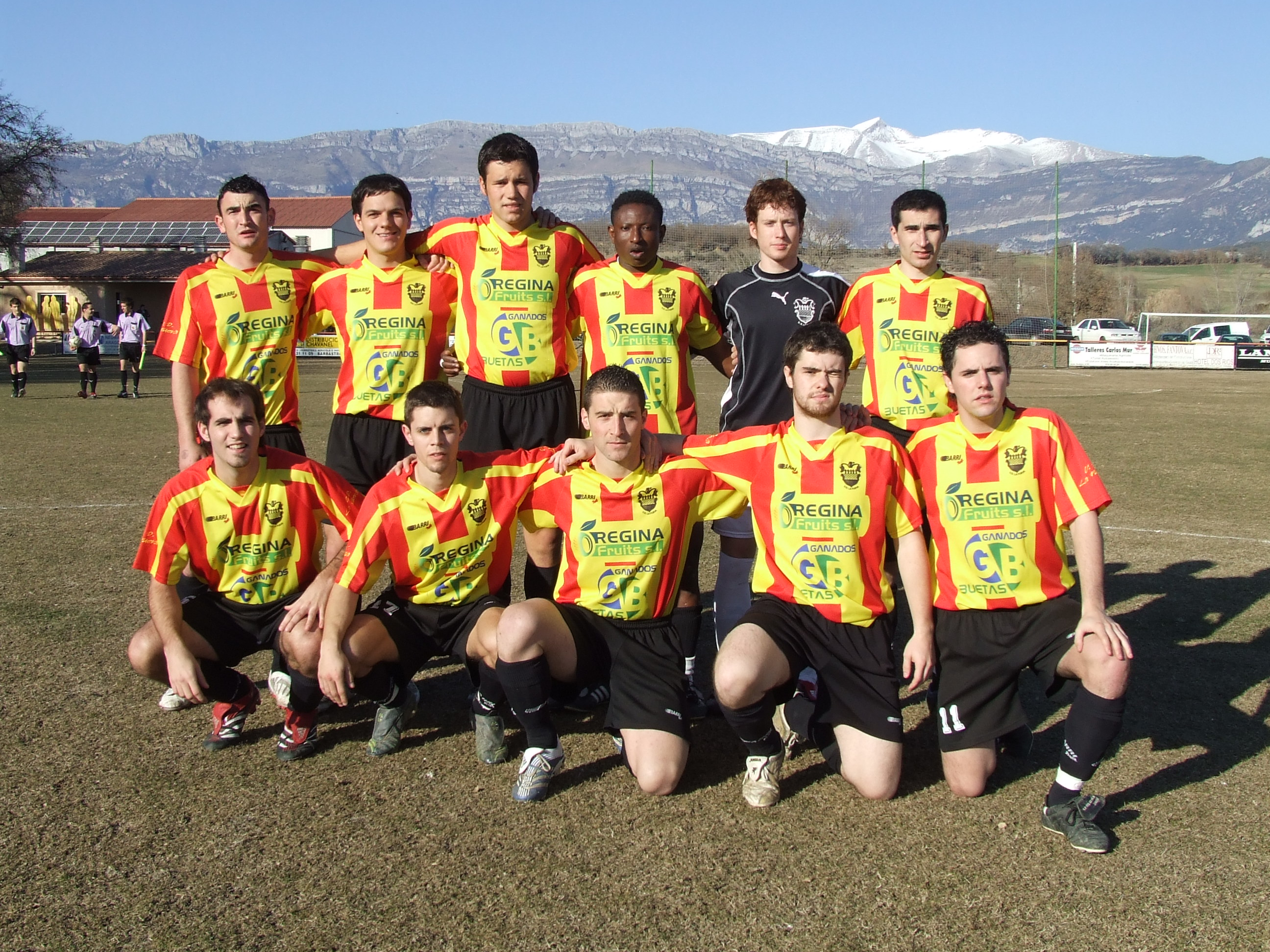 UD La Fueva